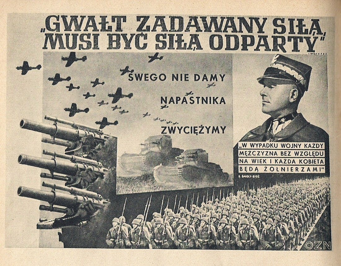 Plakat z 1939. „GWAŁT ZADAWANY SIŁĄ, MUSI BYĆ SIŁĄ ODPARTY.” E. ŚMIGŁY-RYDZ SWEGO NIE DAMY NAPASTNIKA ZWYCIĘŻYMY „W WYPADKU WOJNY KAŻDY MĘŻCZYZNA BEZ WZGLĘDU NA WIEK I KAŻDA KOBIETA BĘDĄ ŻOŁNIERZAMI” E. ŚMIGŁY-RYDZ